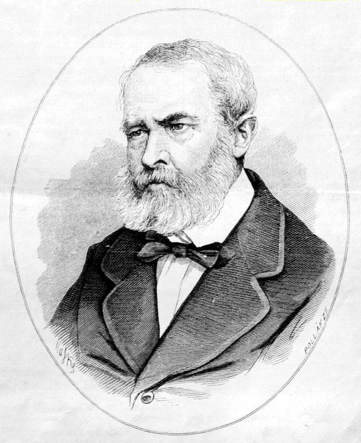 Duschek Ferenc (1797–1873) politikus, pénzügyi szakember, miniszter portréja. Pollák Zsigmond metszete